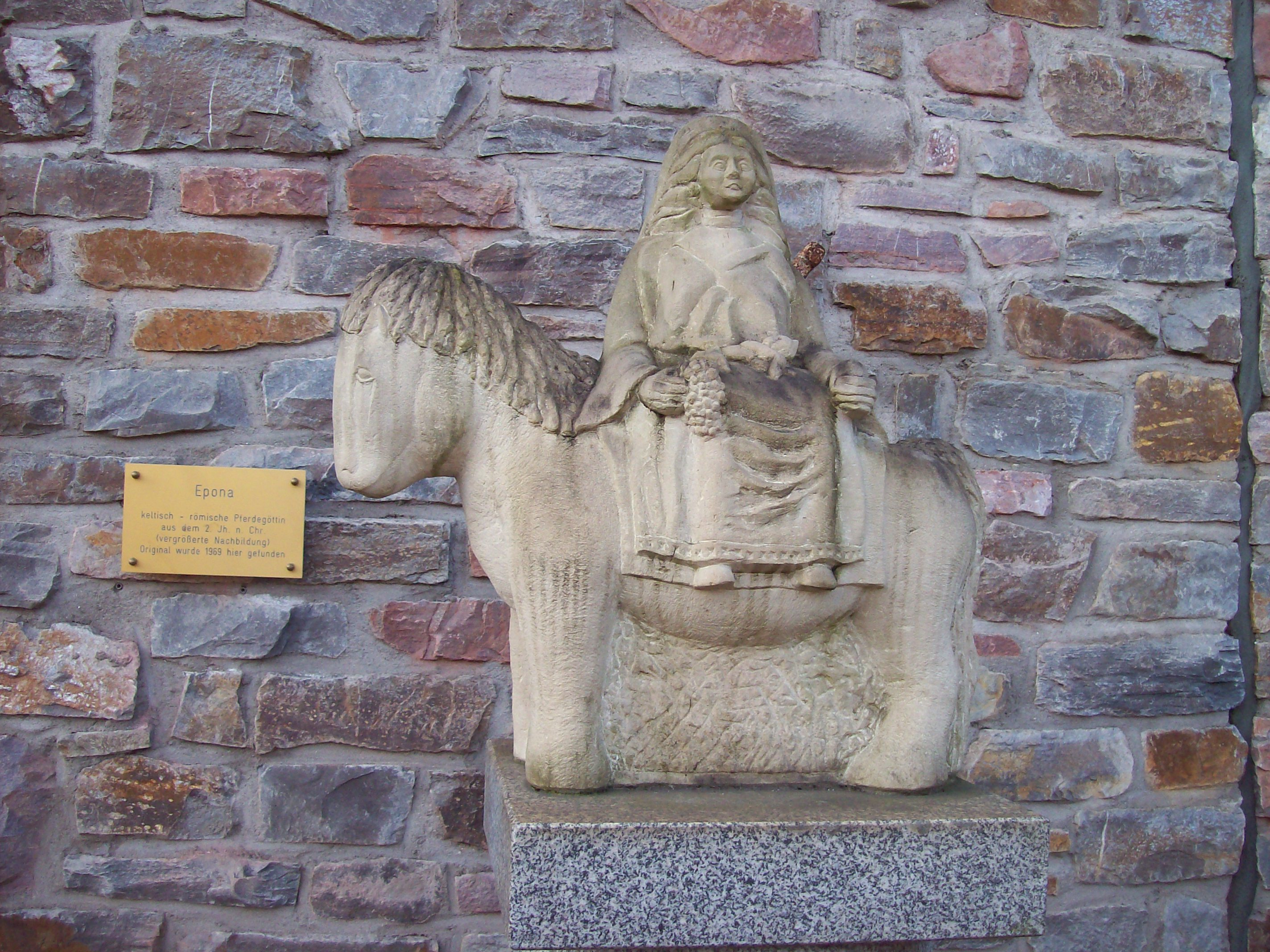 Nachbildung der im ehemaligen römischen Vicus gefundenen Figur der Pferdegöttin Epona am Anfang des Mühltals in Boppard